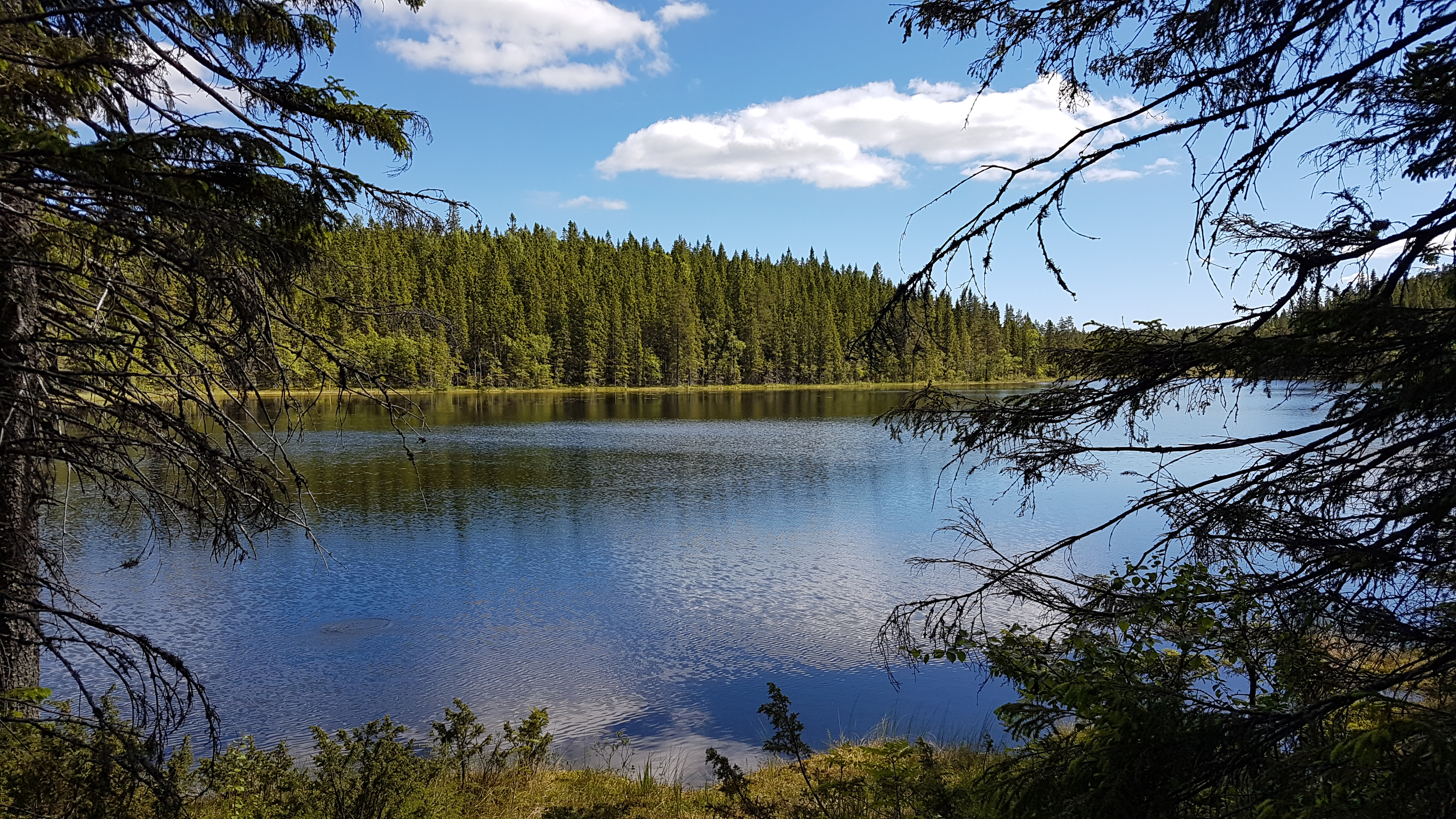 Långtjärnen i Skuleskogens nationalpark 2017.